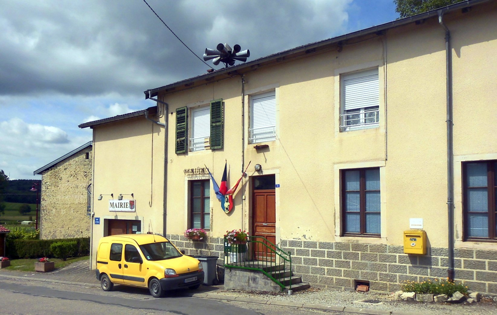 La mairie de They-sous-Montfort